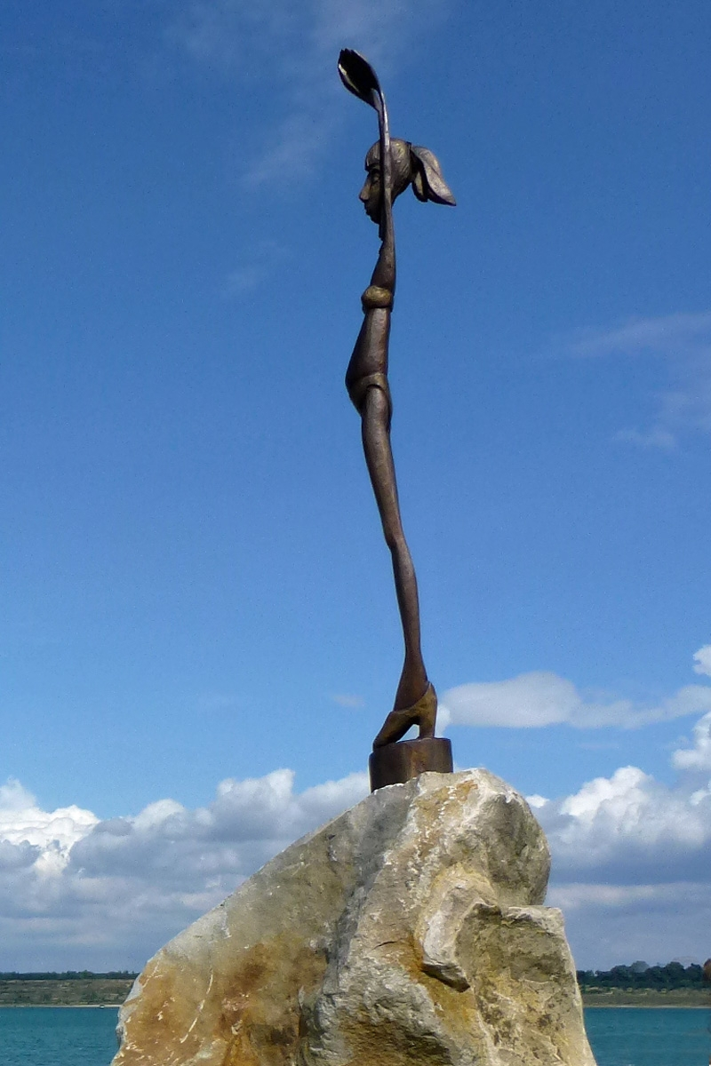 Bronzestatue Bella Gruna am Ferienresort Lagovida in Erinnerung an den Ortsteil Gruna des durch den Braunkohleabbau verlorengegangenen Ortes Magdeborn